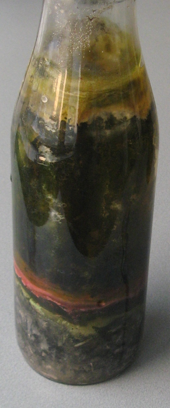 Колонка Виноградського, витримана упродовж 3-х років